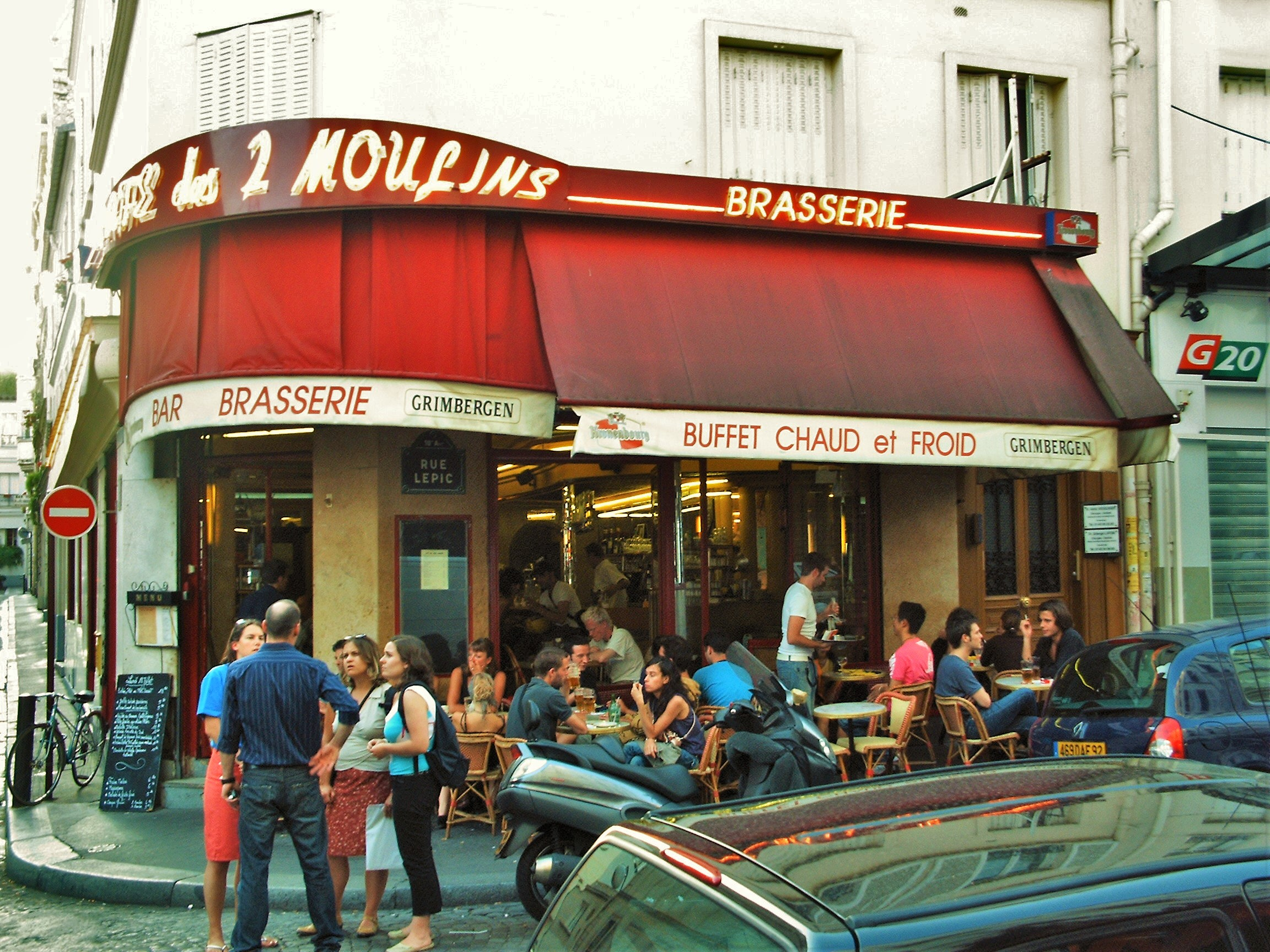 Café Les 2 Moulins